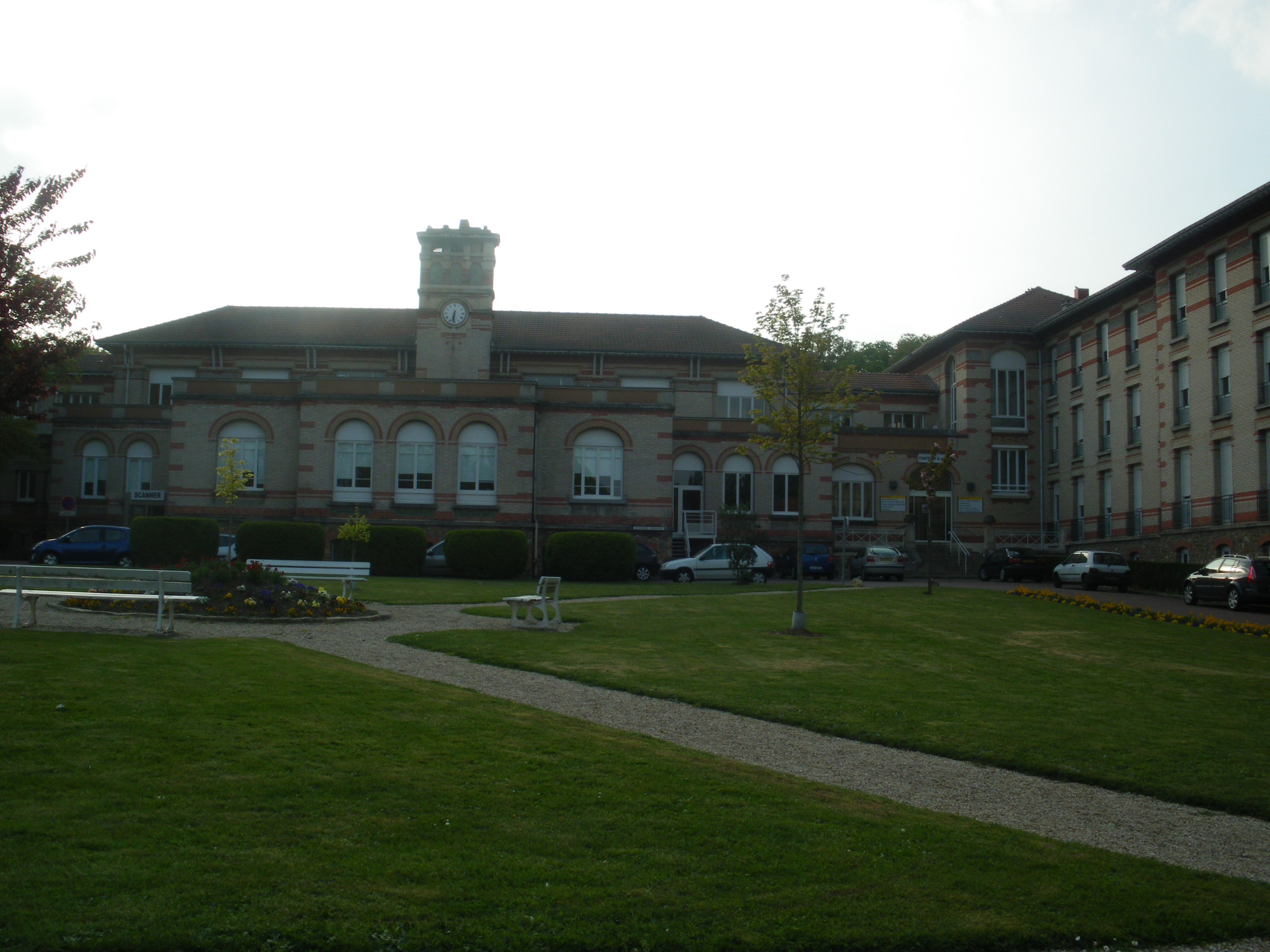 Hopital de Bligny, Fontenay les Briis, Essonne, France